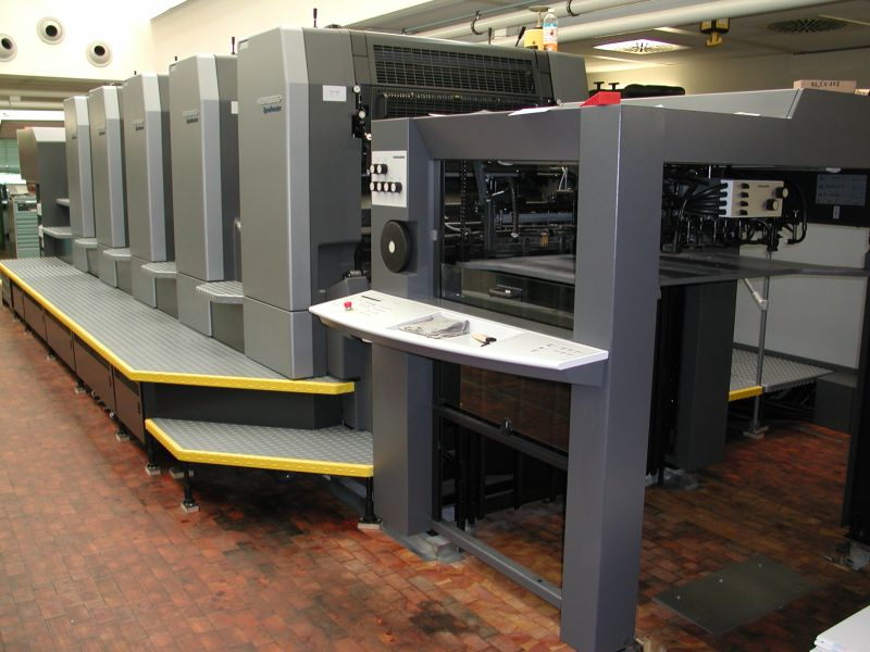 Druckmaschine Heidelberg Speedmaster CD 102-4 der Firma Heidelberg im Landesvermessungsamt Koblenz